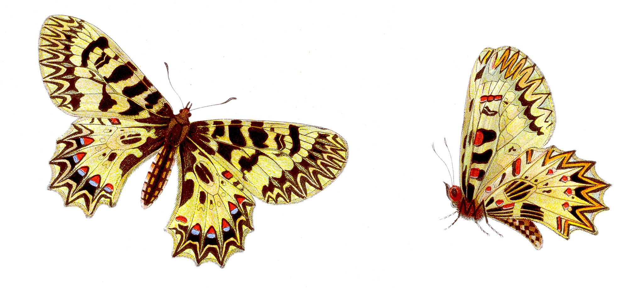 Südlicher Osterluzeifalter - Zerynthia polyxena